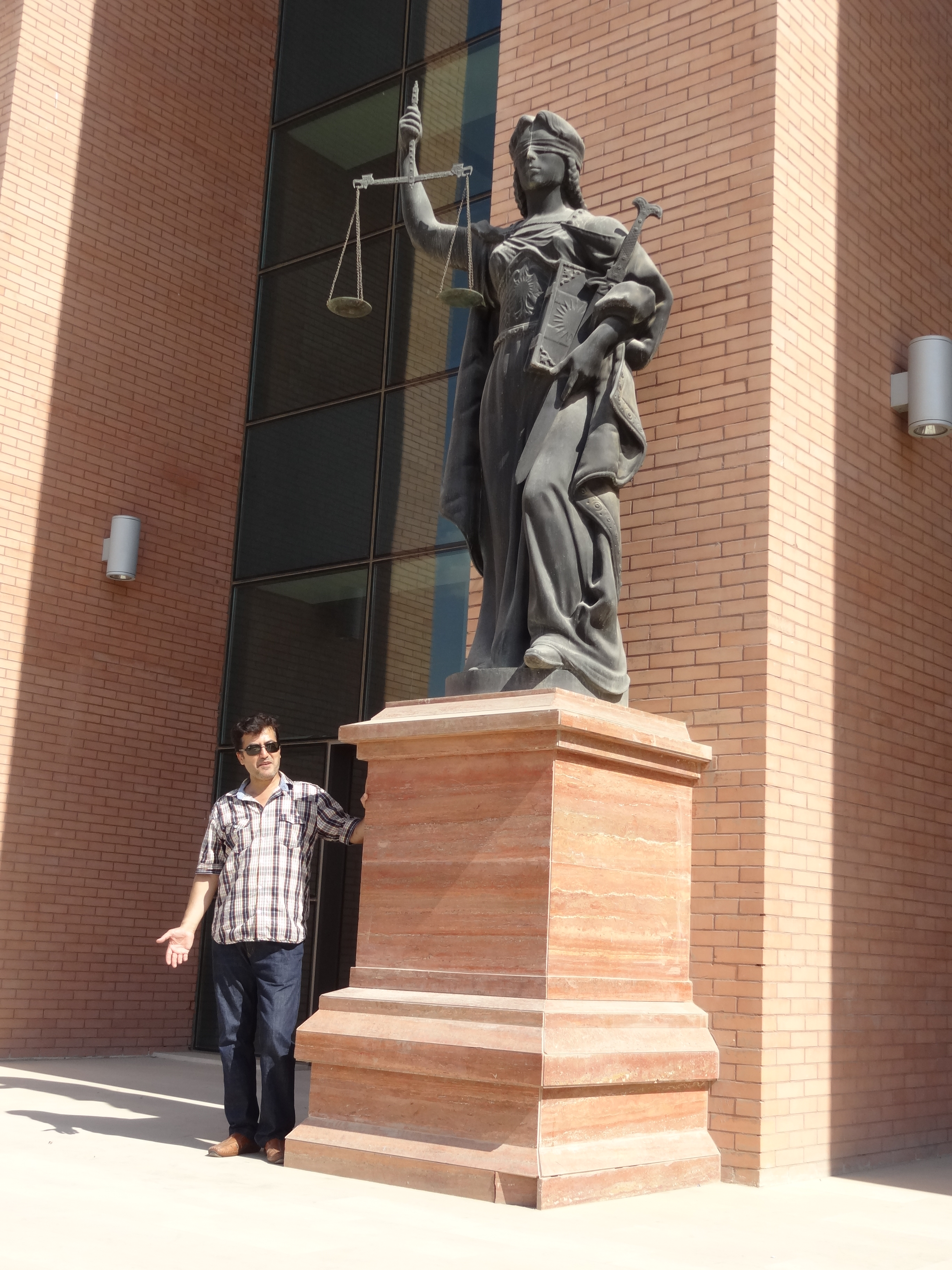 justitia sculptuur,Arbil,Kurdistan Irak,2013